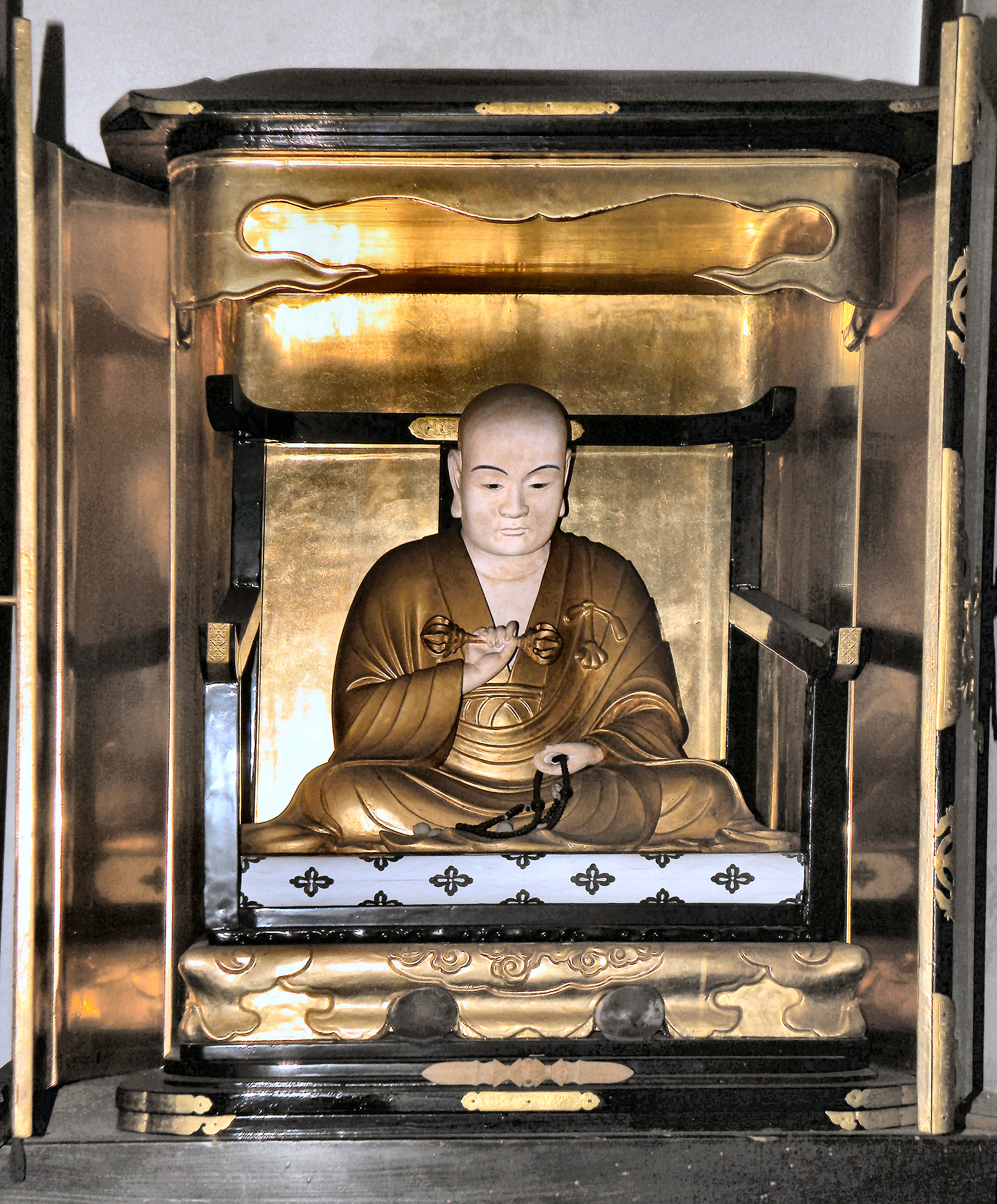 木像弘法大師坐像（普門寺＝88番札所）